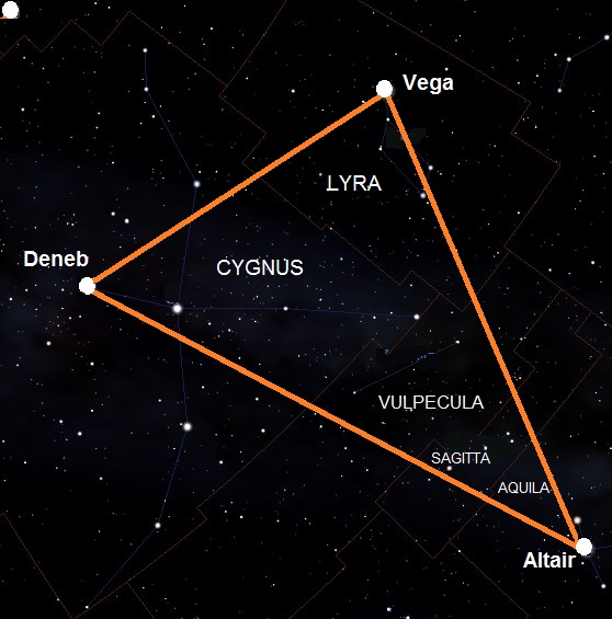 El Triángulo estival formado por la alineación de las brillantes estrellas veraniegas: Vega, Altair y Deneb.